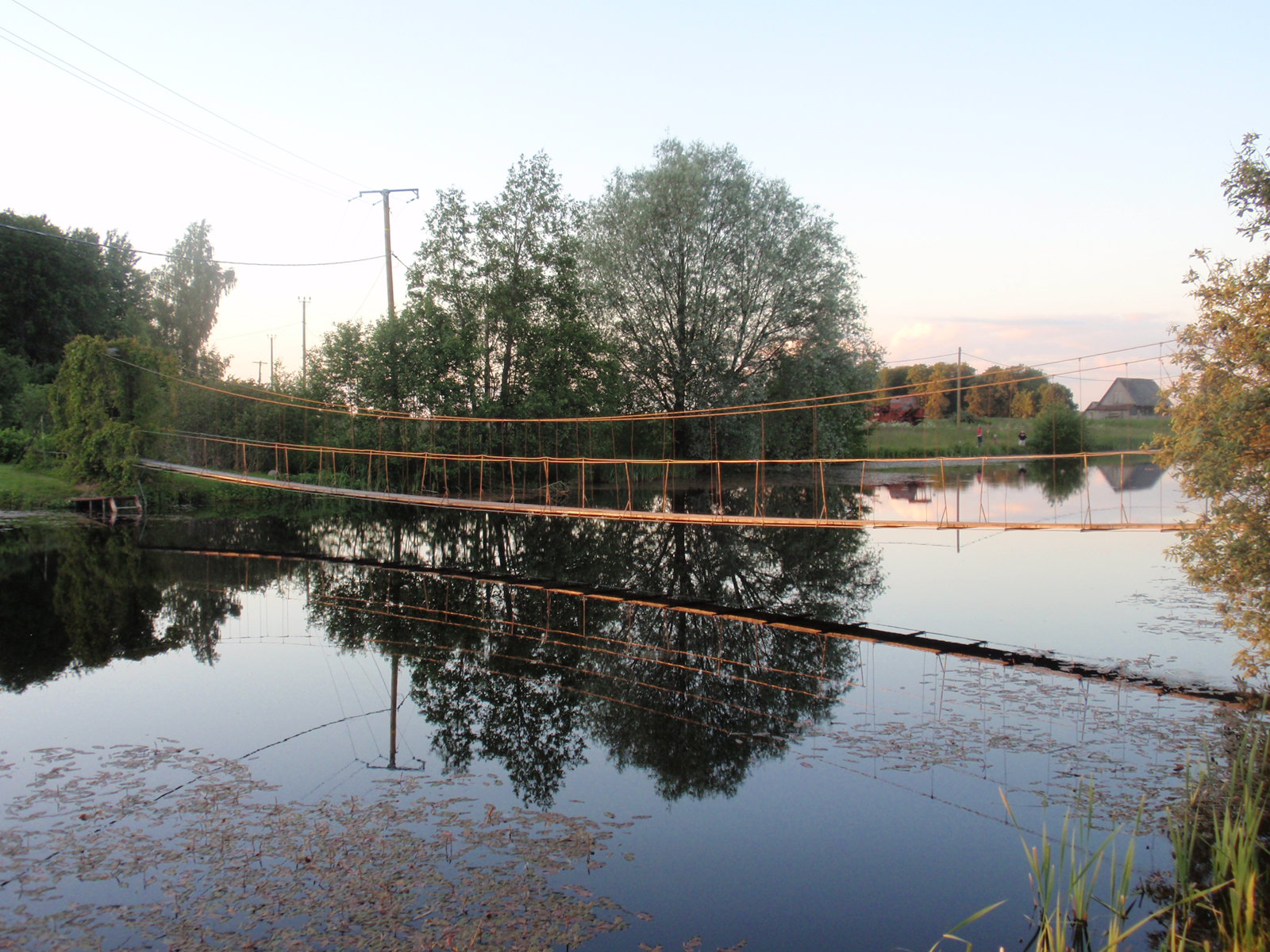 Kõpu Varese rippsild üle Kõpu järve.